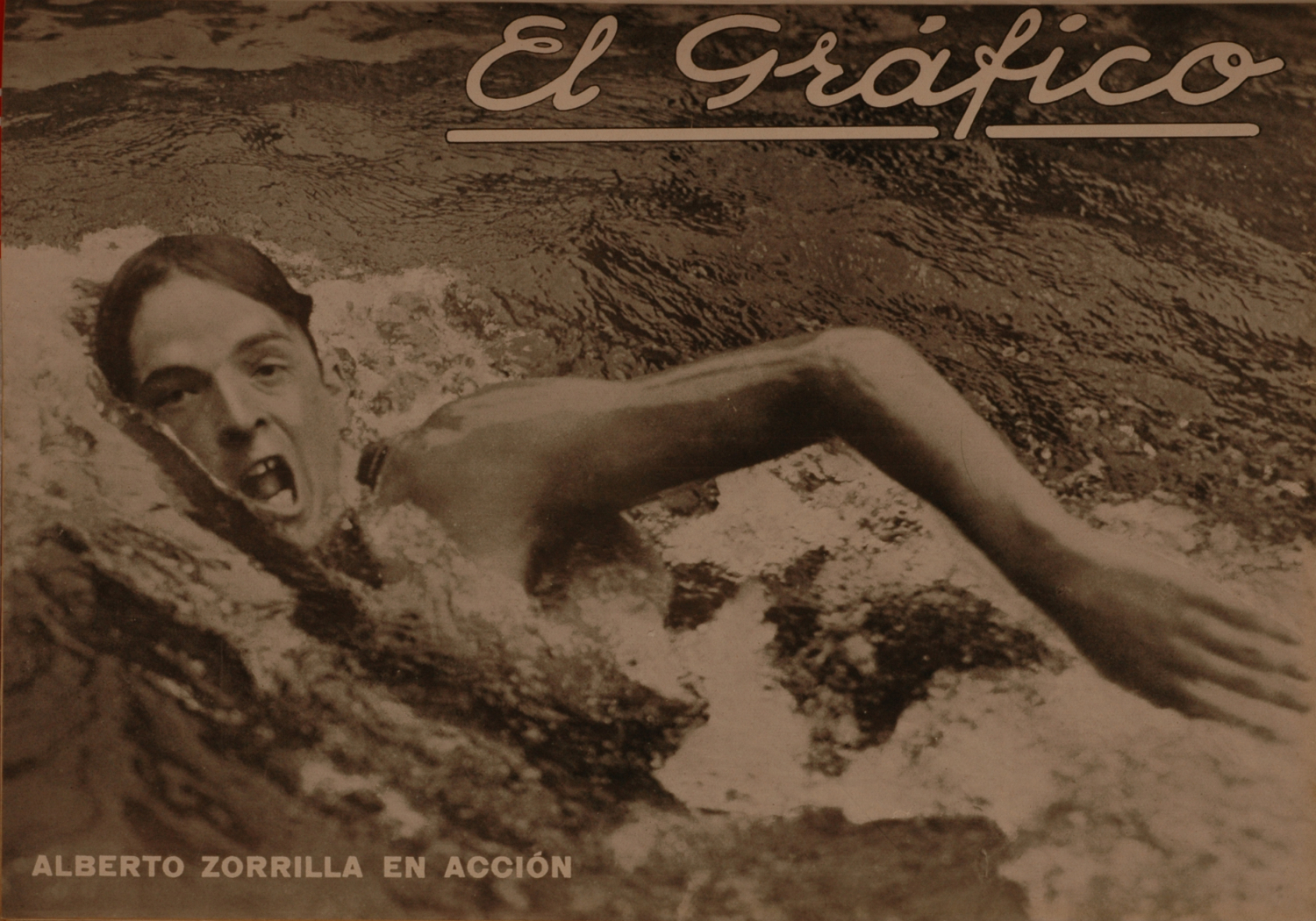 El Grafico del 07 de Diciembre de 1929. Edicion 543